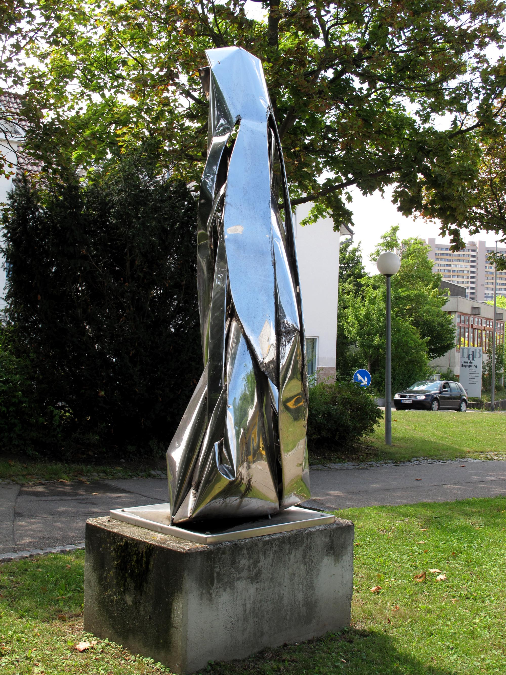 Karl-Heinz Franke, Kavernikus, Edelstahl, 1986, - Deutschland, Baden-Württemberg, Leonberg, Eltinger Straße